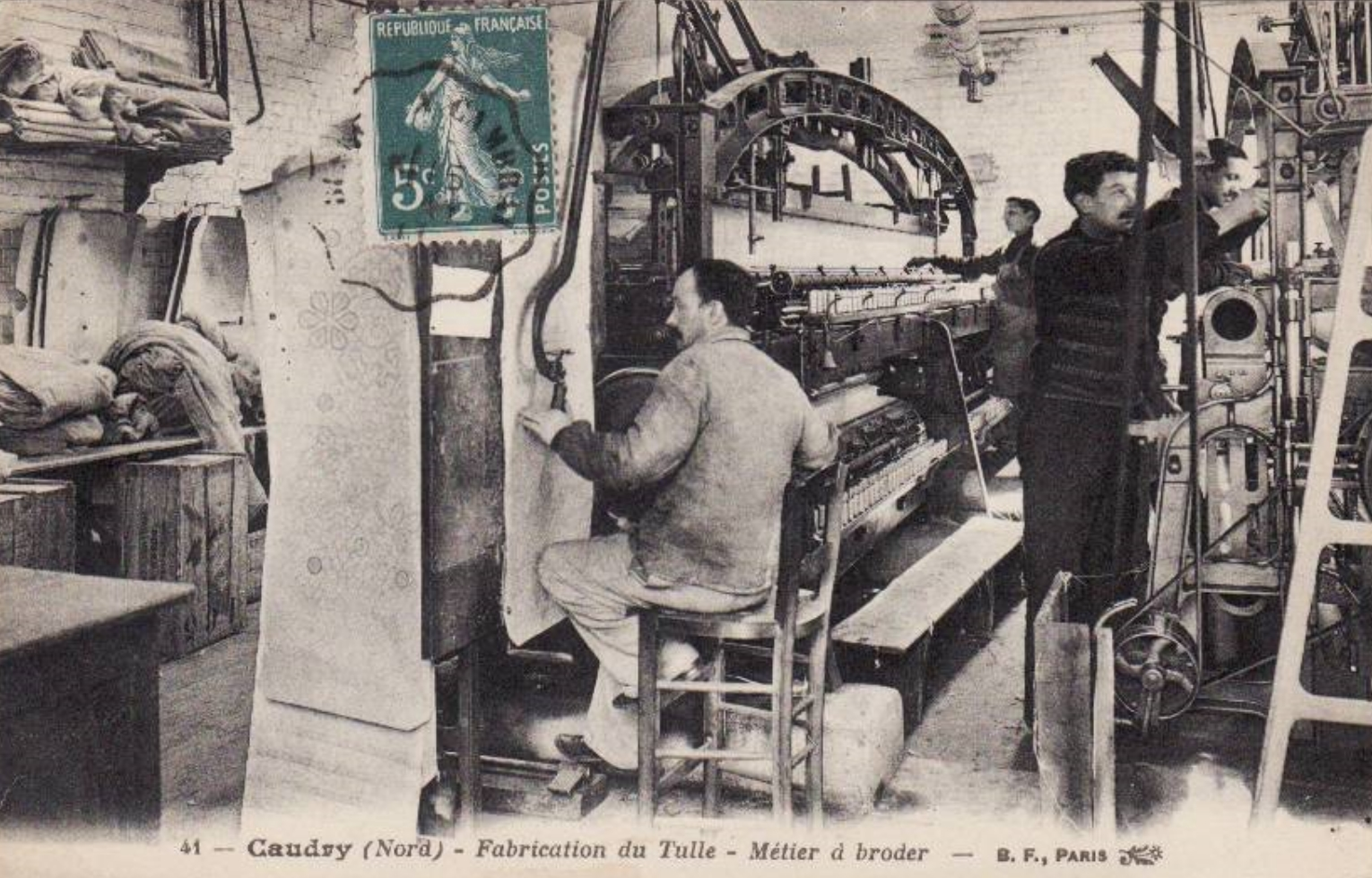 Fabrication du tulle, Métier à broder, Caudry, Nord, Nord-Pas-de-Calais, France.